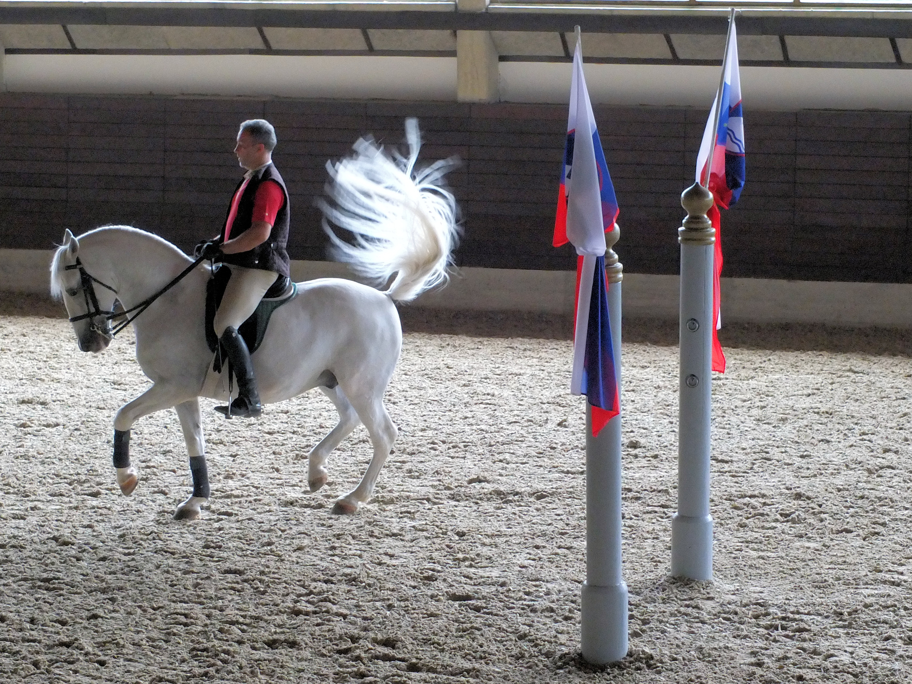 Lipica Stud Farm, Slovenia, June 2012